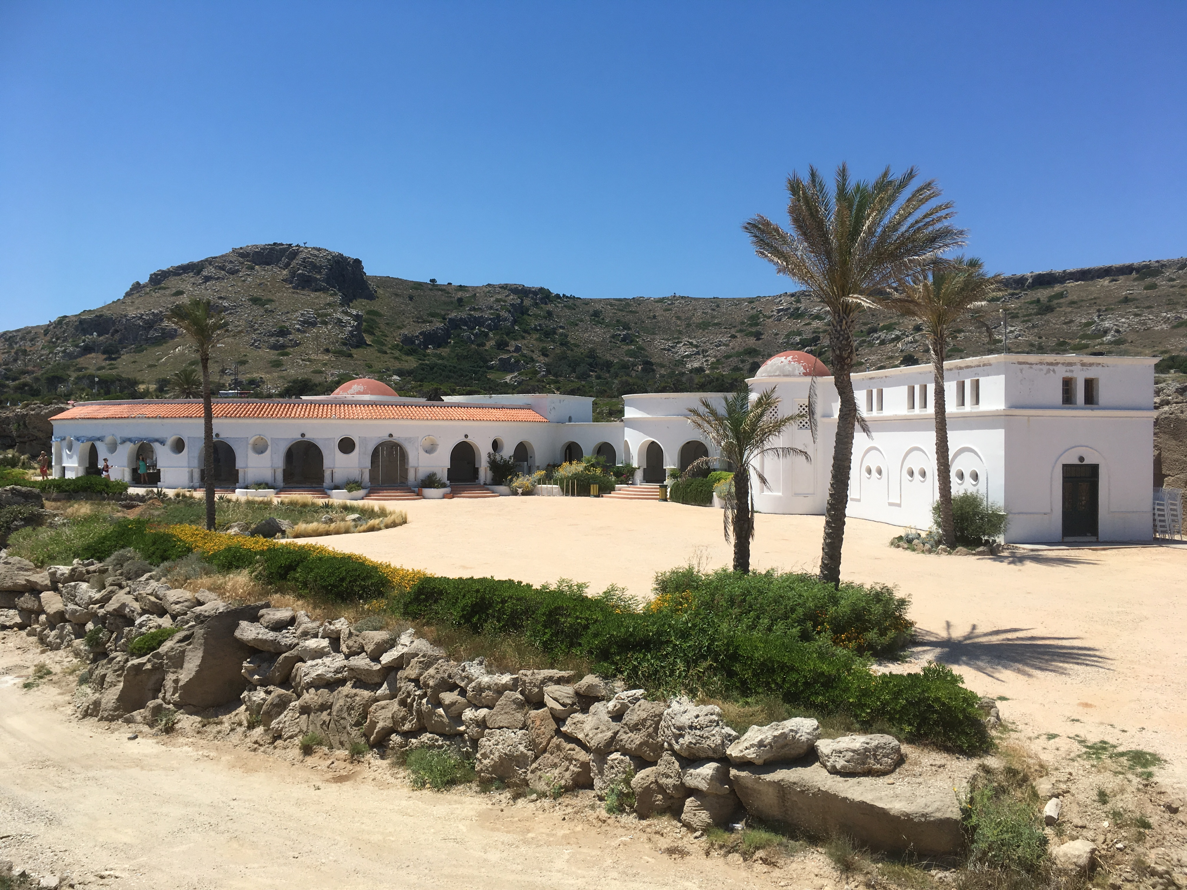 Kallithea, Rhodos Location movie Escape to Athena